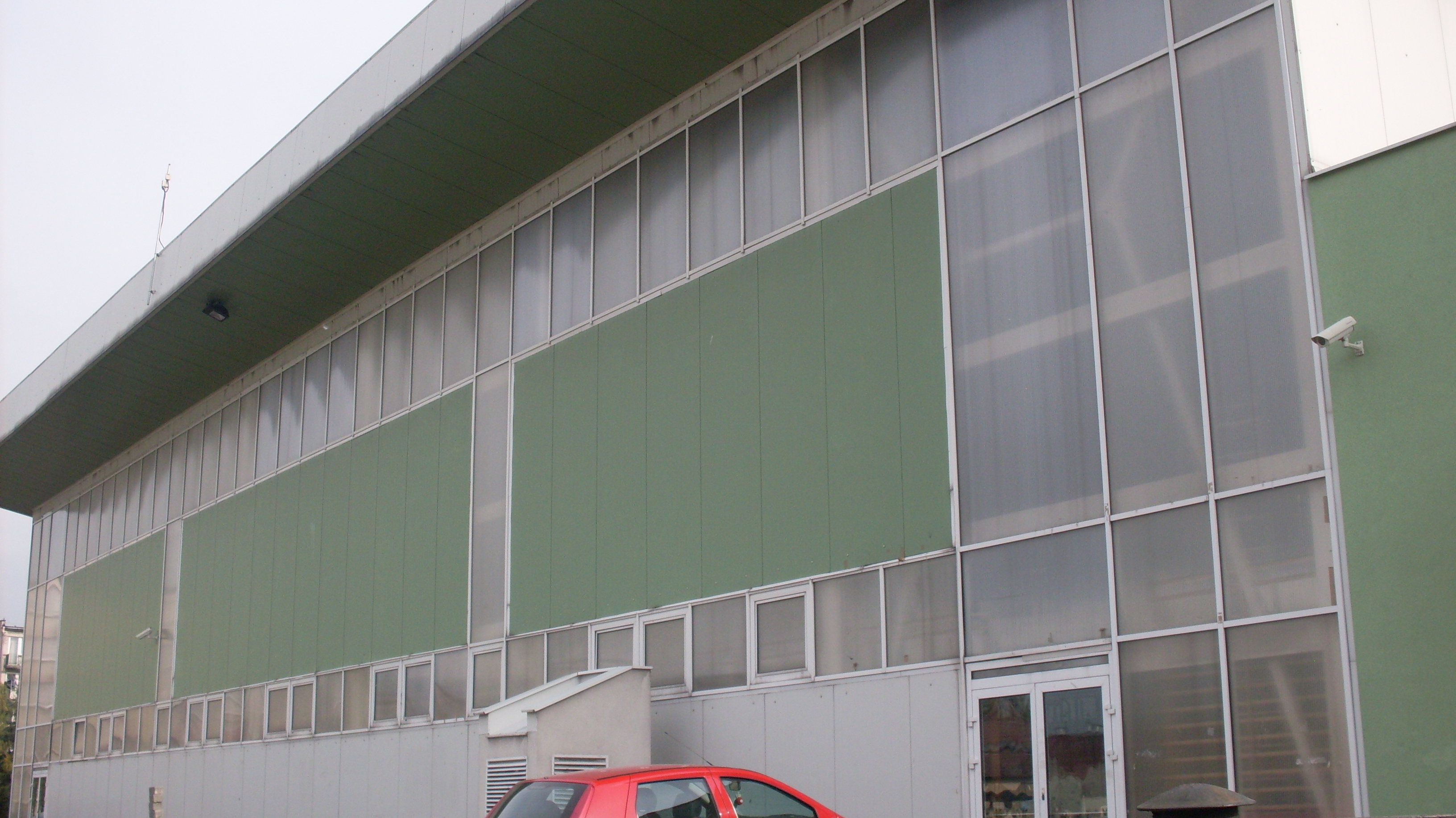 Krzeszowice. Hala sportowa